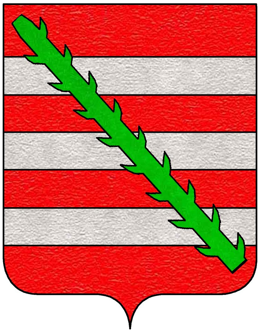 Stemma della famiglia Carafa della Spina